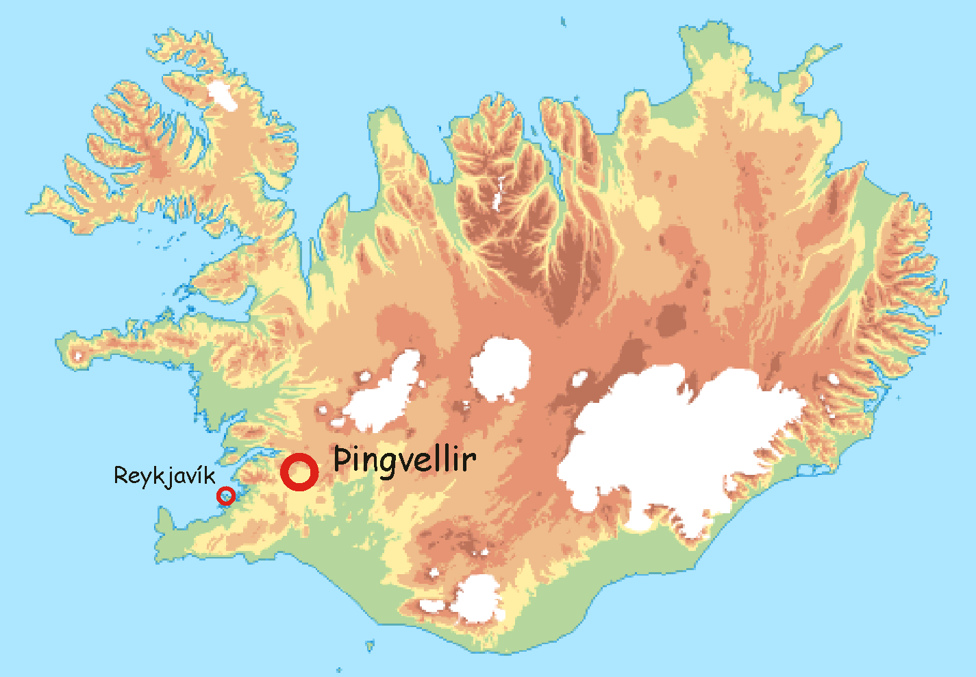 Localisation de Reykjavik et Þingvellir sur une carte d'Islande